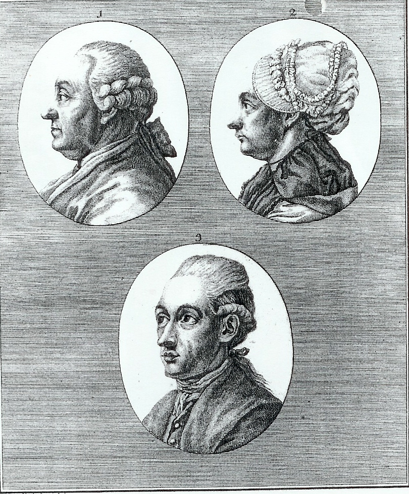 Portraittafel von Johann Wolfgang Goethe und seinen Eltern Johann Caspar Goethe und Catharina Elisabeth Goethe